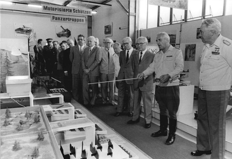 DDR, NVA-Truppenbesuch, Honecker ADN-ZB Mittelstädt 21.6.84 DDR: Truppenbesuch- Der Generalsekretär des ZK der SED und Vorsitzender des Staatsrates der DDR, Erich Honecker, Vorsitzender des Nationalen Verteidigungsrates der DDR, und weitere Mitglieder der Partei-und Staatsführung Staatsführung unternahmen einen Truppenbesuch bei den Landstreitkräften der NVA. Beim Rundgang durch das ausbildungstechnische Zentrum machten sich die Gäste mit Geräten und Anlagen vertraut, die wesentlich zur Erhöhung des Niveaus der spezialfachlichen und der Gefechtsausbildung beitragen; 2.v.v. der Chef der Landstreitkräfte, Generaloberst Horst Stechbarth. [v.r.:Heinz Hoffmann, Stechbarth, Honecker, Stoph, Mielke, Sindermann, Mittag, Krenz] Abgebildete Personen: Honecker, Erich: Staatsratsvorsitzender, Generalsekretär des ZK der SED, DDR (GND 118553399) Hoffmann, Heinz: Minister für Nationale Verteidigung, Mitglied des ZK der SED, DDR Stechbarth, Horst: Stellvertretender Minister für Nationale Verteidigung, Generaloberst, DDR Stoph, Willi: Ministerpräsident, Staatsratsvorsitzender, Armeegeneral, SED, DDR Mittag, Günter Dr.: Stellvertretender Staatsratsvorsitzender, Politbüro des ZK der SED, FDGB, DDR (GND 11897629X) Krenz, Egon: Vorsitzender der FDJ, Generalsekretär des ZK der SED, Staatsratsvorsitzender, DDR